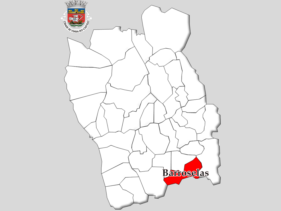 Censos 1864/2011